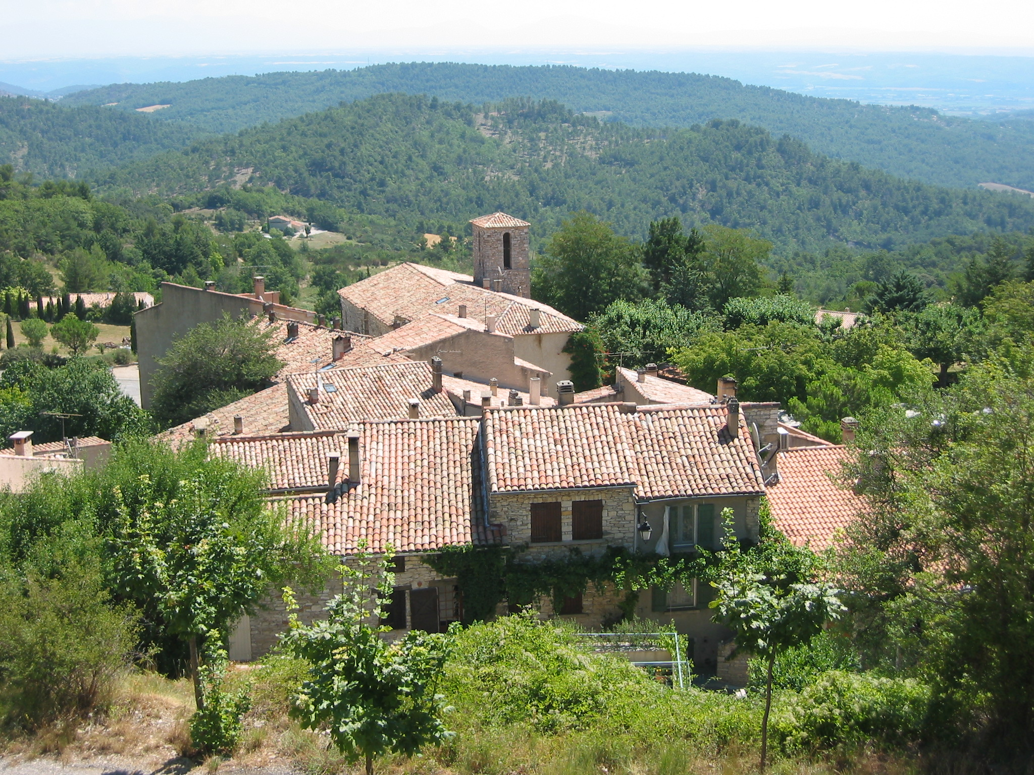 Montfuron, Alpes-de-Haute-Provence, France Le village Photo prise le 30 juillet 2006 Aut : civodule